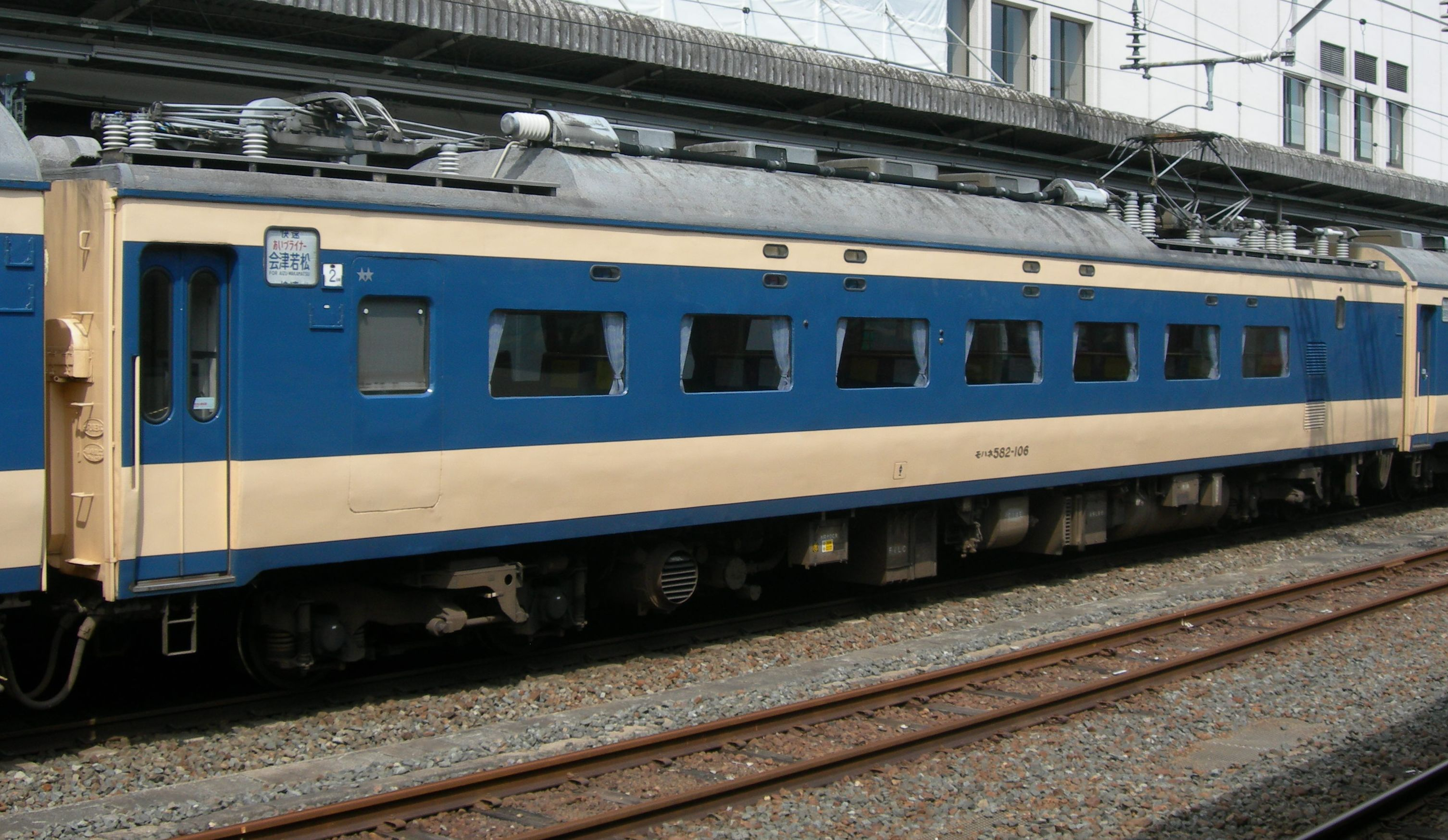 583系電車 モハネ582-106